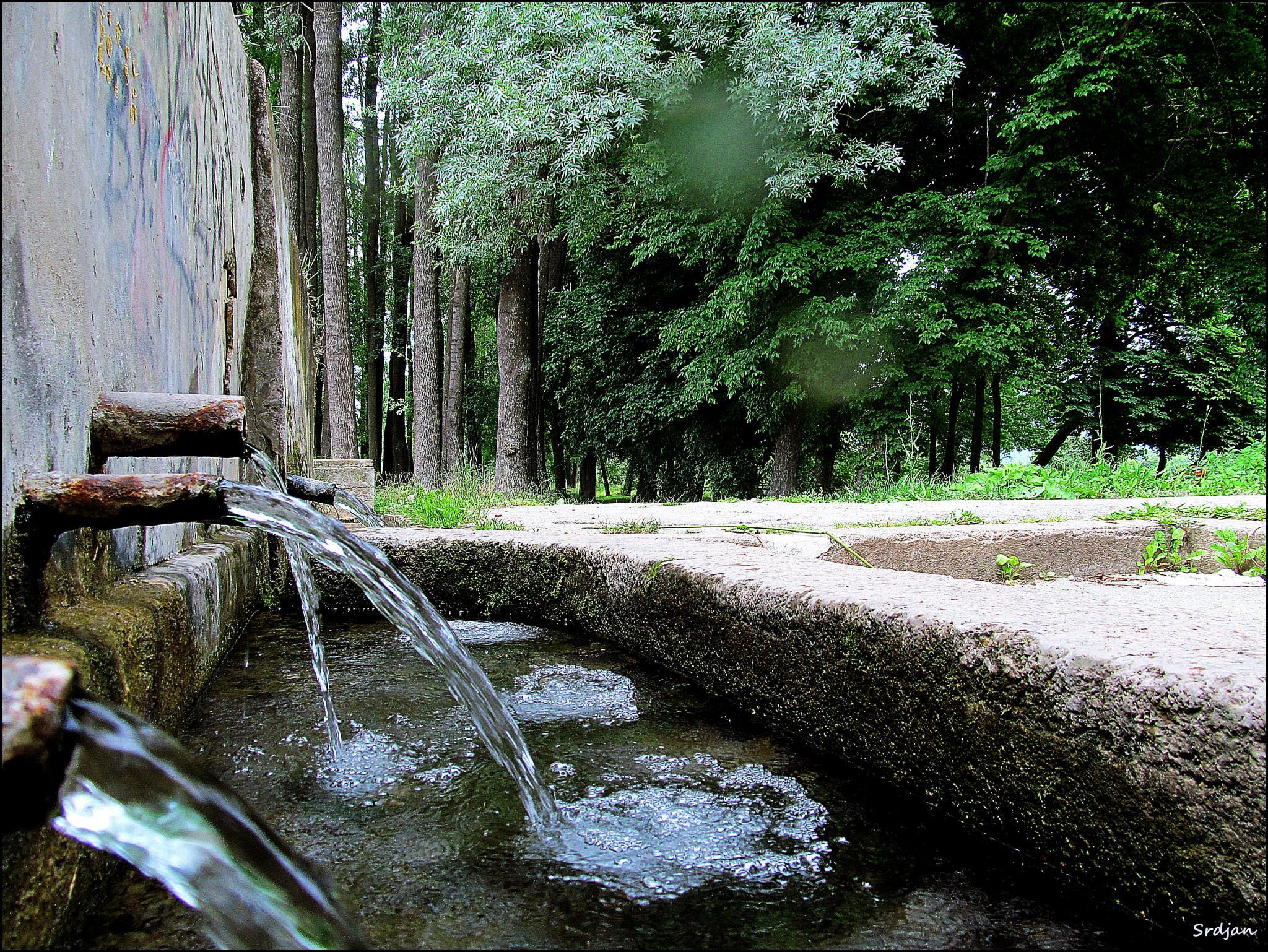 Српски (ћирилица): Врело Школска чесма у Нишкој Бањи (код старе школе, одатле и назив), чија је издашност 2,5 литара у секунди, а температура воде од 17°-19°С.